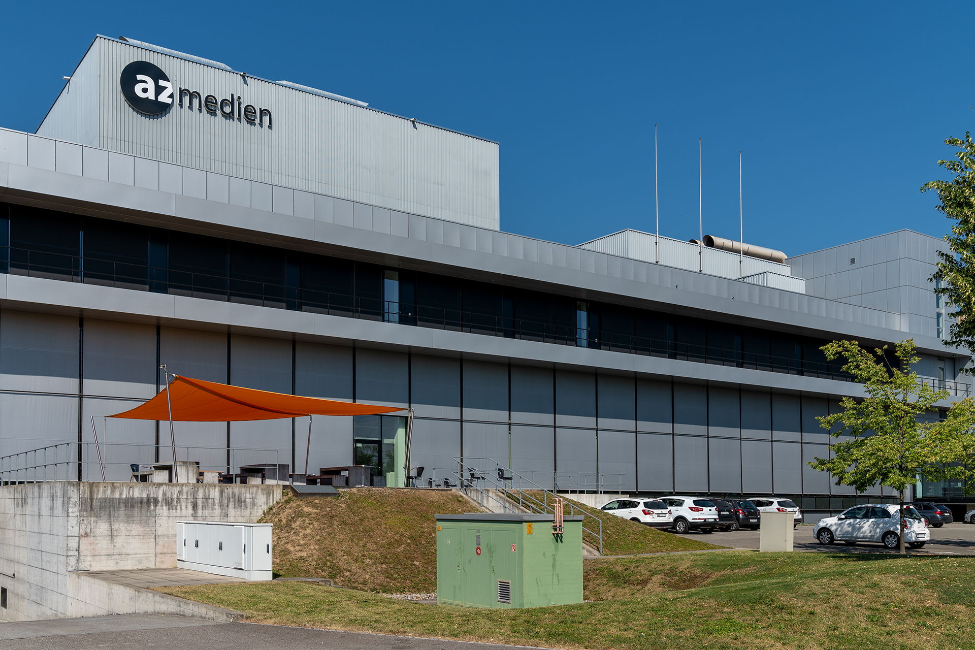 Hauptsitz der az-Medien in Aarau